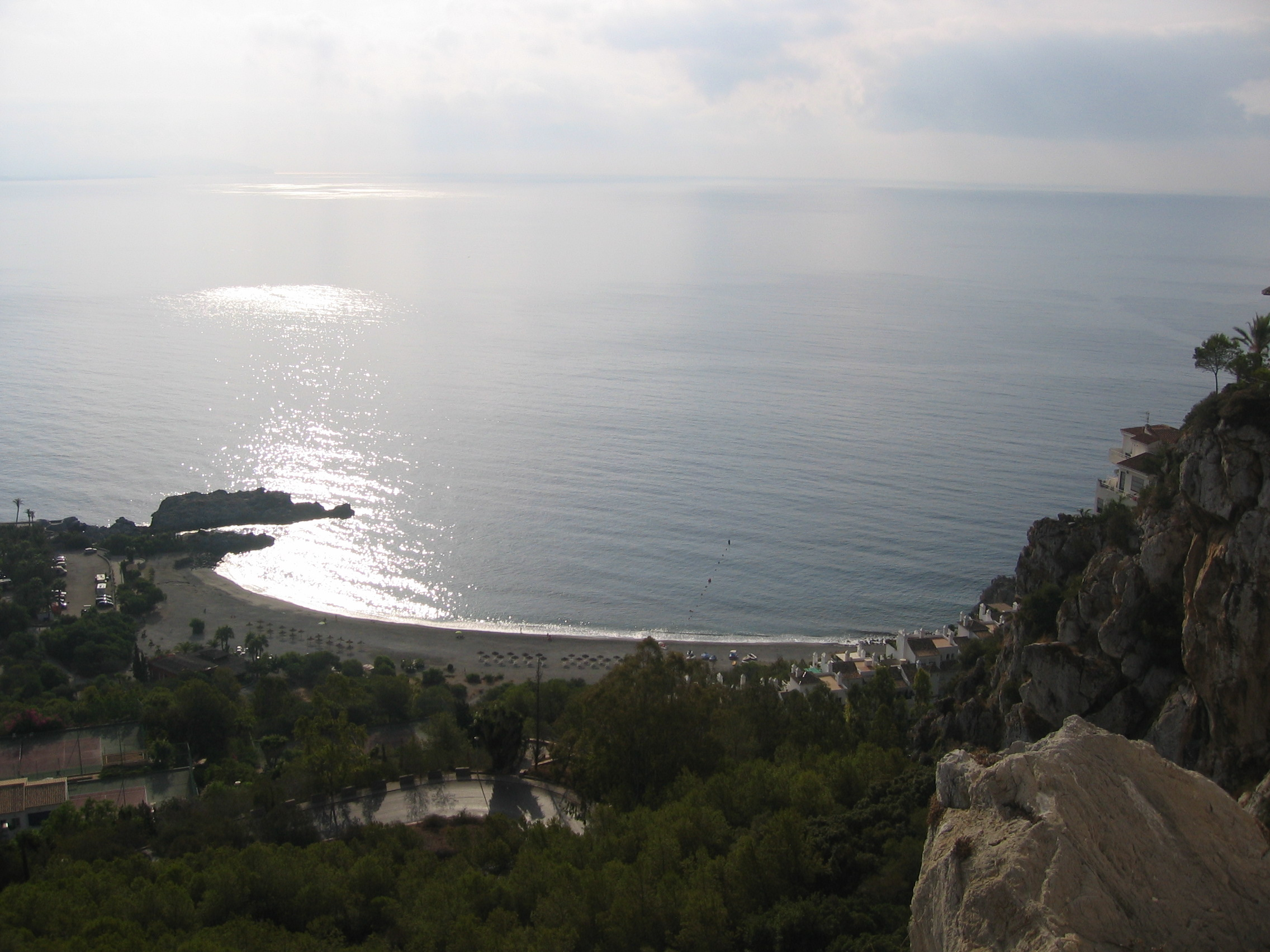 Maria del Este desde el faro de La Herradura